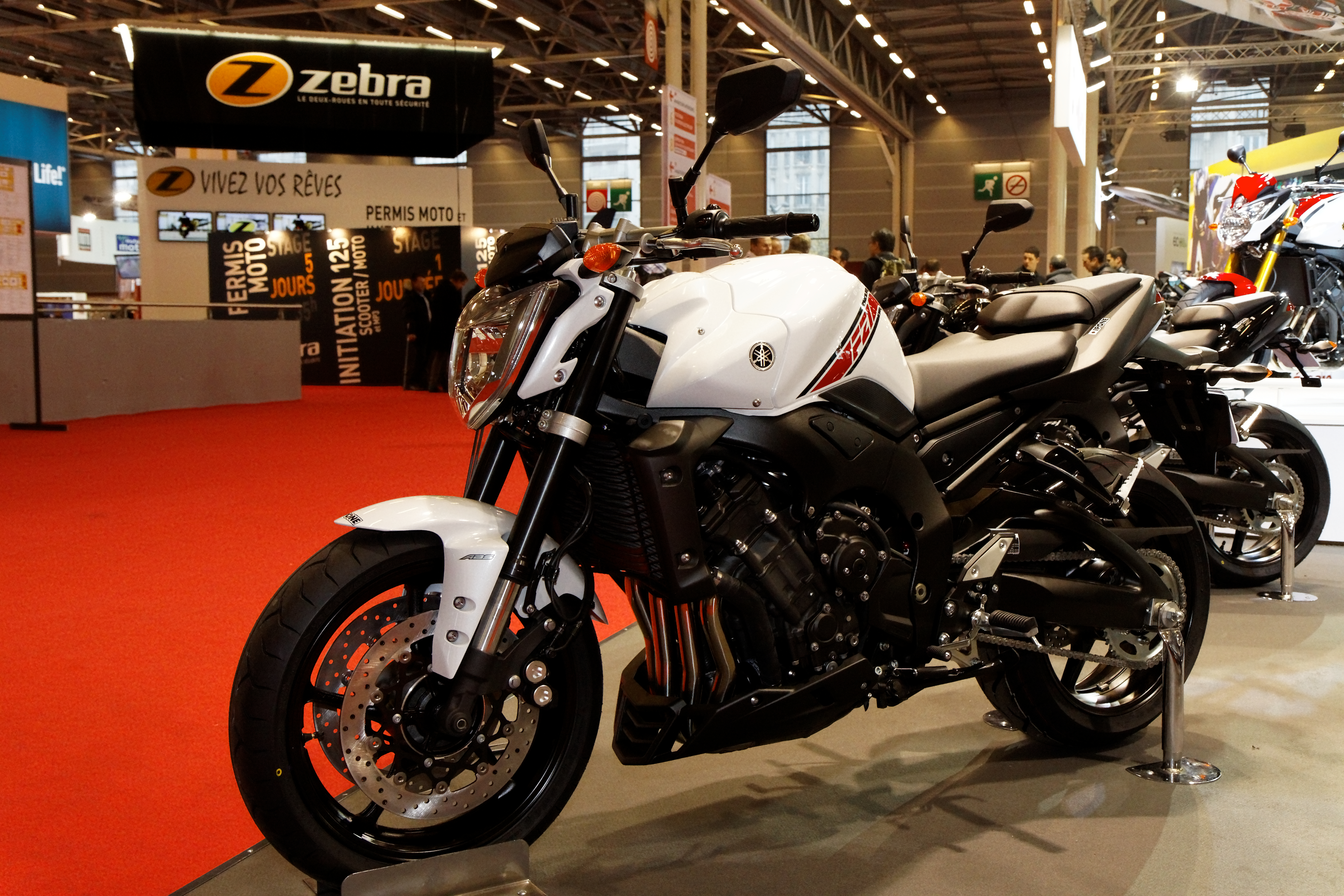 Une moto Yamaha au salon de la moto, Paris, porte de Versailles.